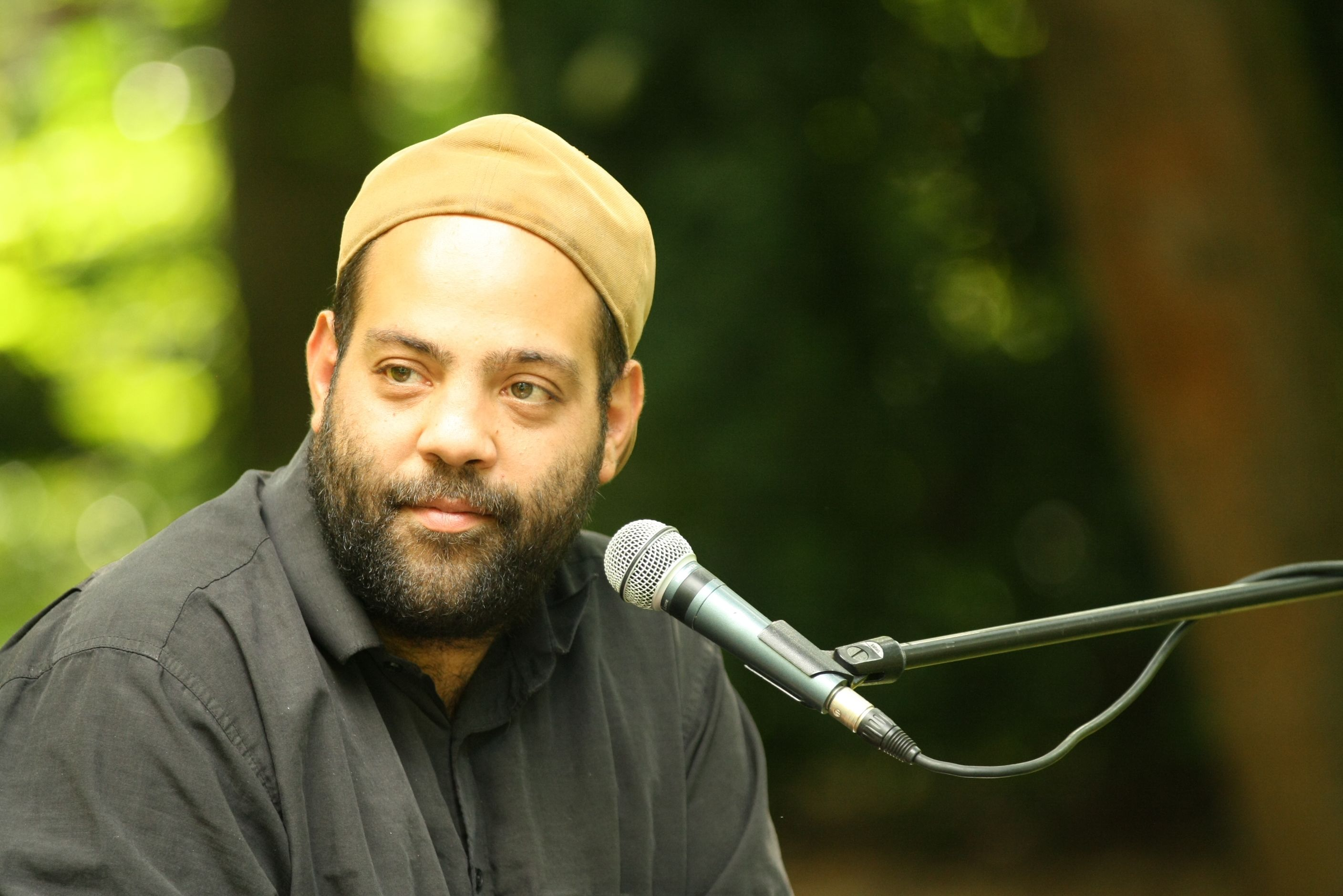 Maruan Paschen stellt auf dem Erlanger Poetenfest 2014 seinen Roman "Kai" vor.